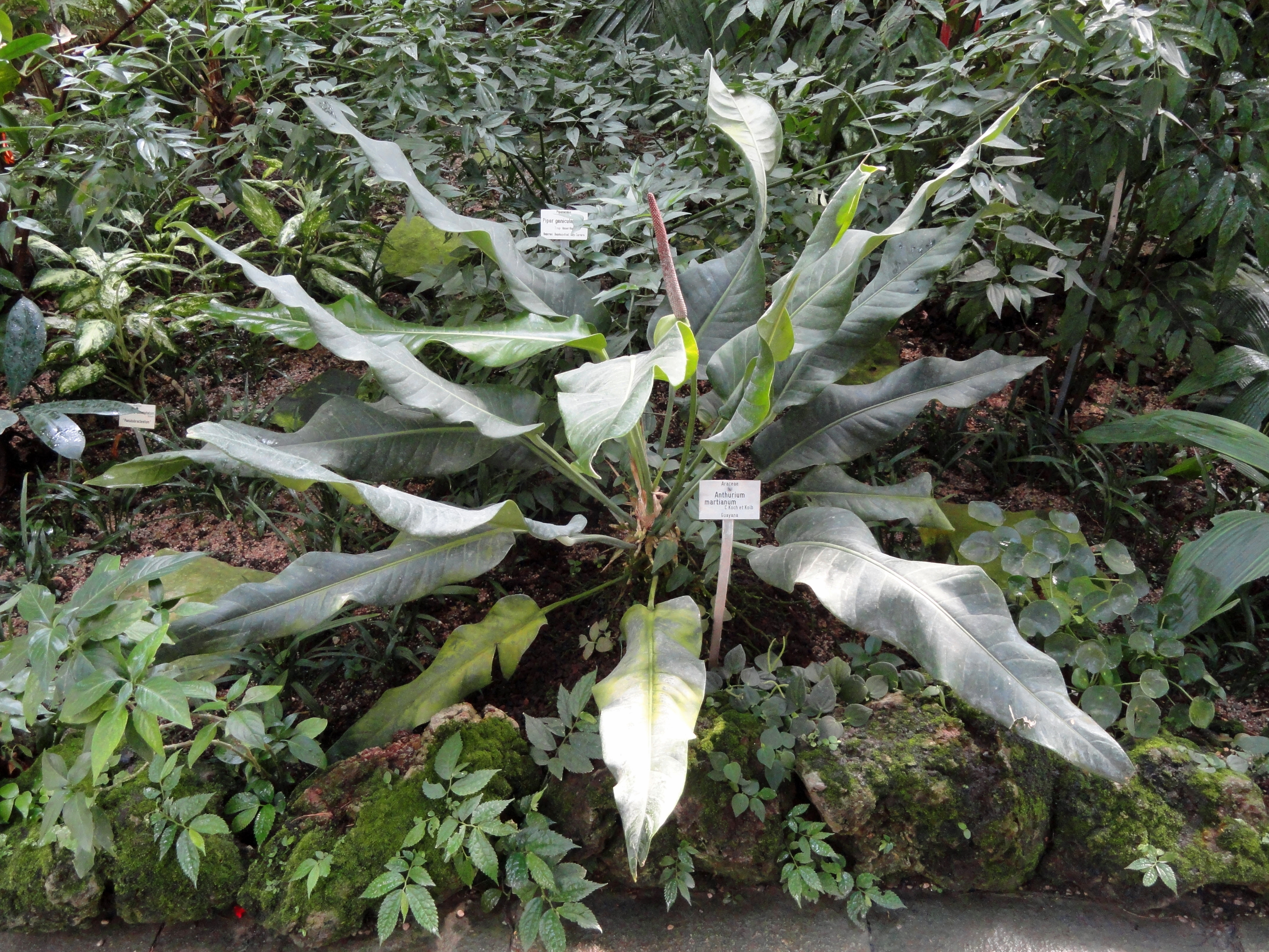 Anthurium martianum specimen in the Botanischer Garten München-Nymphenburg, Munich, Germany.